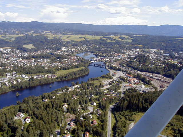 Hønefoss (med Ådalselva og til høyre jernbanestasjonen)